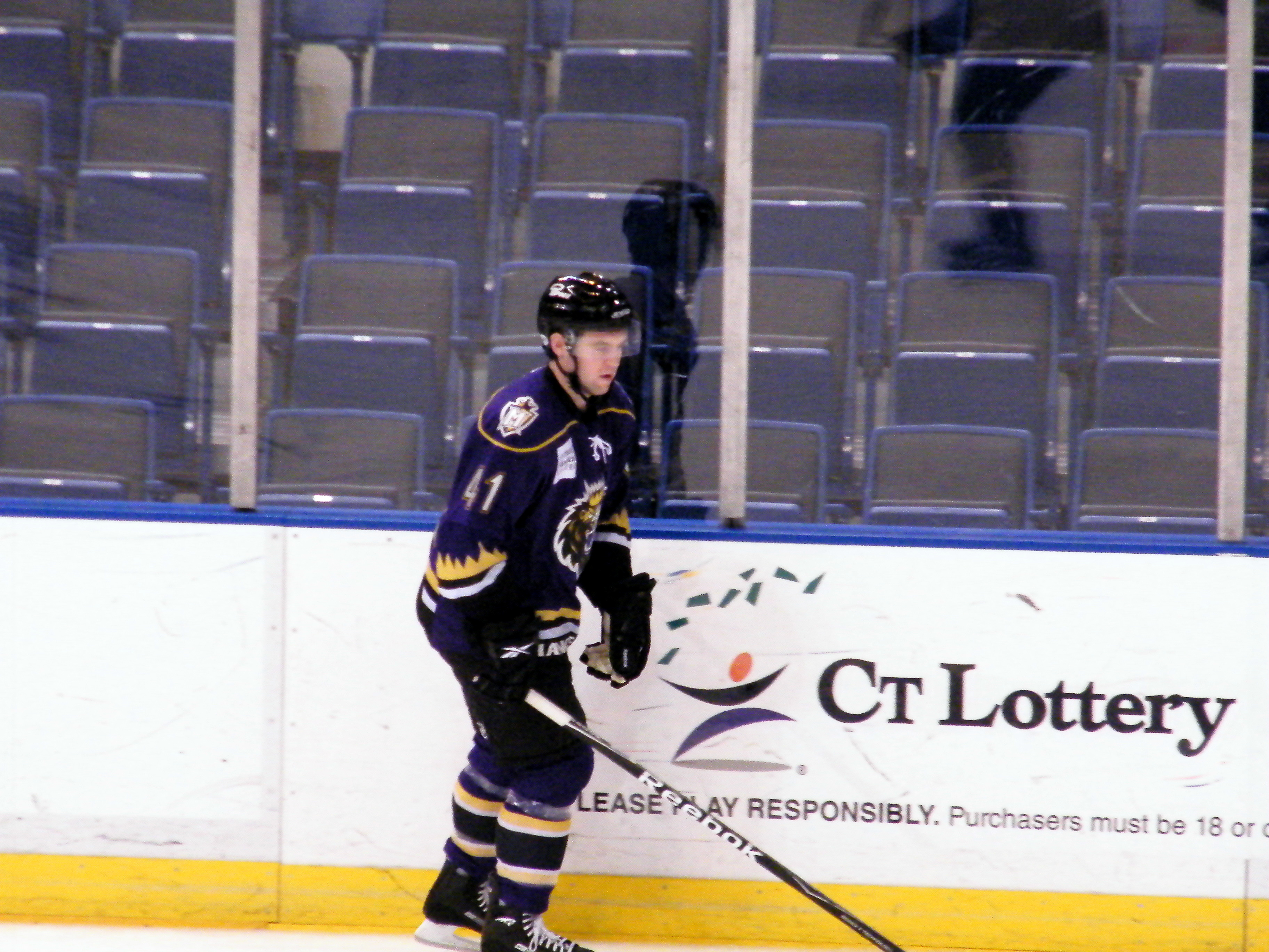 Tom Cavanagh